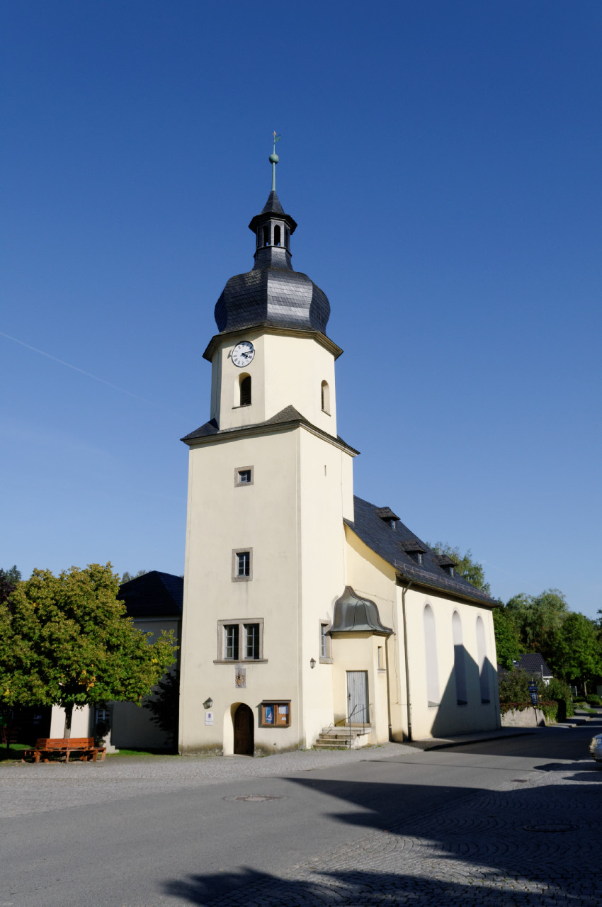 Joditz: Sankt Johannes